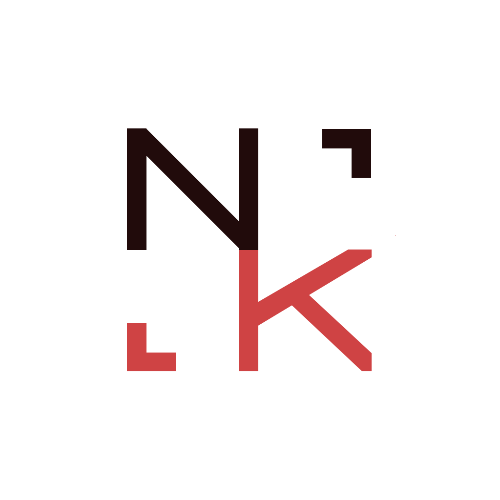 NKL